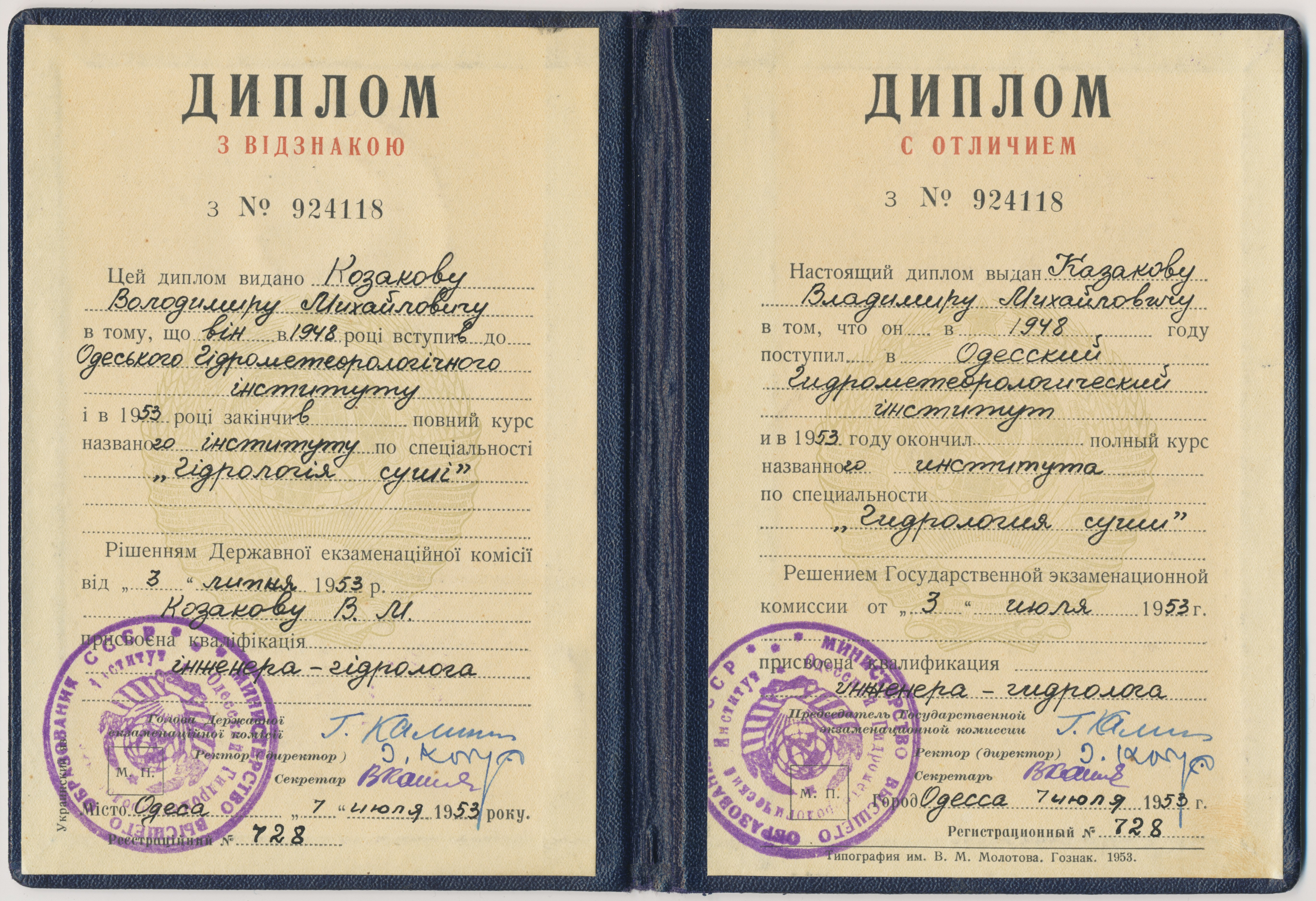 Диплом с отличием инженера-гидролога, Казаков Владимир Михайлович (1923-2001), выдан в 1953 г., Одесский гидрометеорологический институт